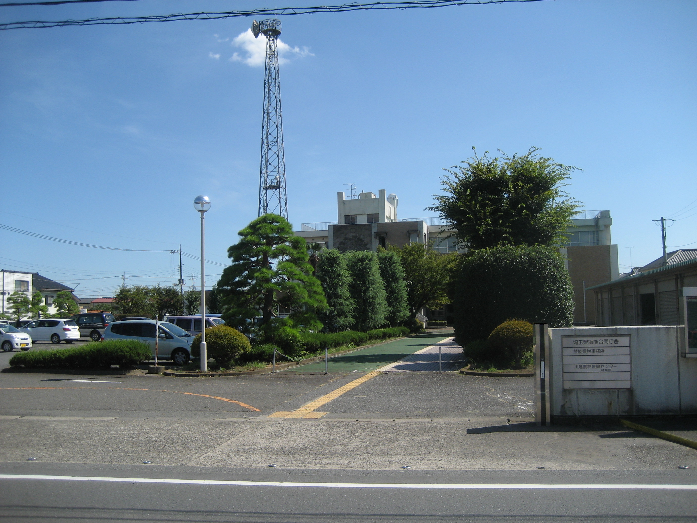 埼玉県飯能合同庁舎入口付近